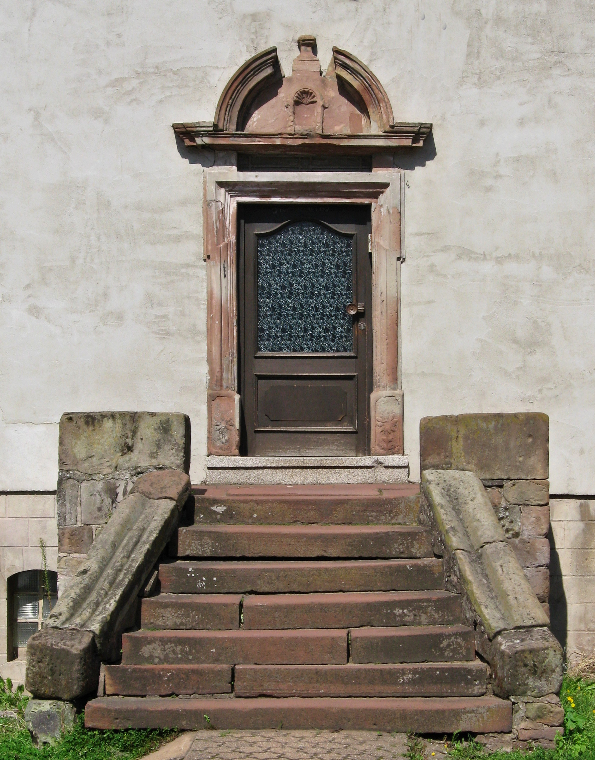 Treppe des Treppenhauses in Dillingen